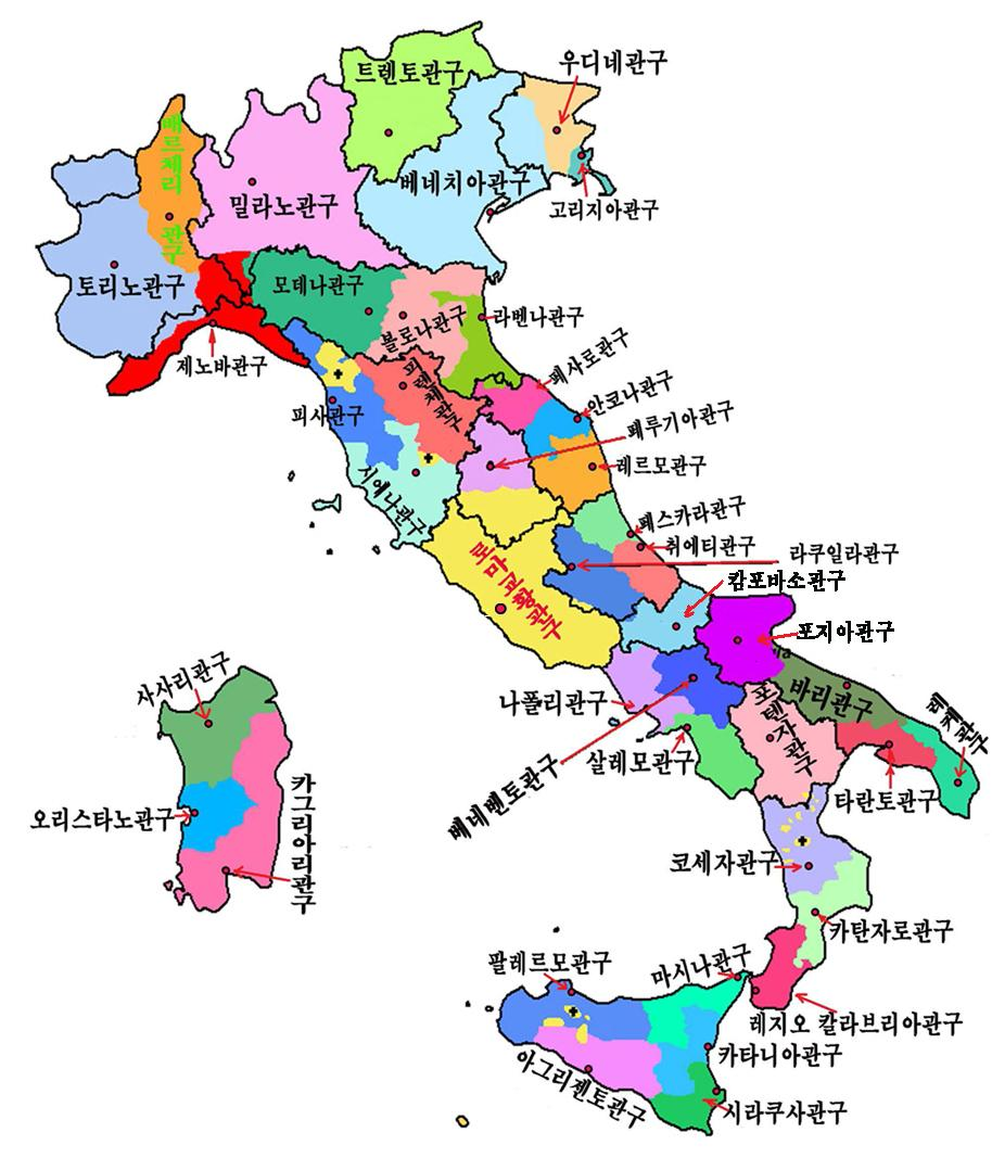 이탈리아 로마가톨릭관구도